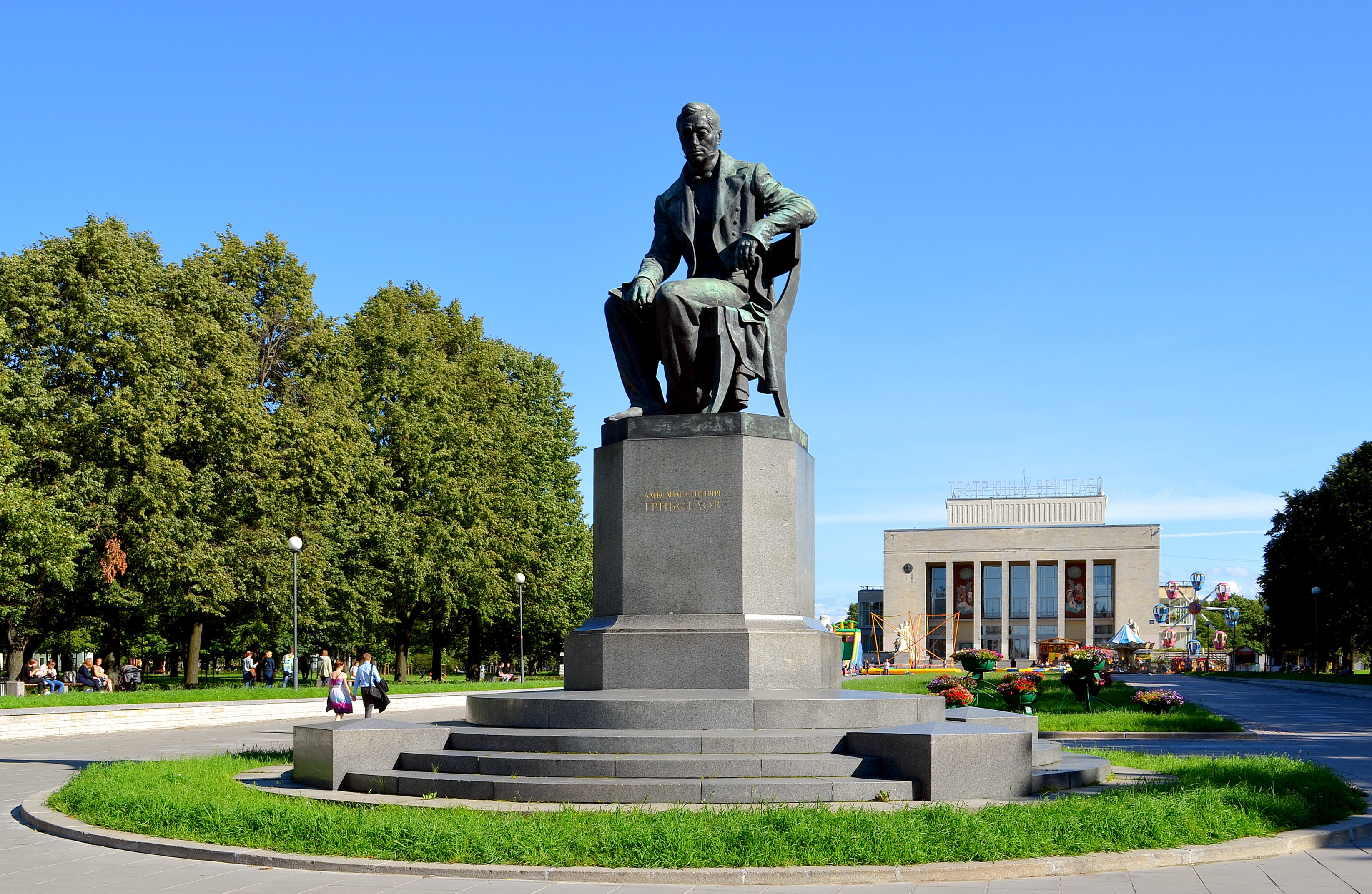 Памятник писателю Грибоедову А.С.: Пионерская площадь, Адмиралтейский район, Санкт-Петербург